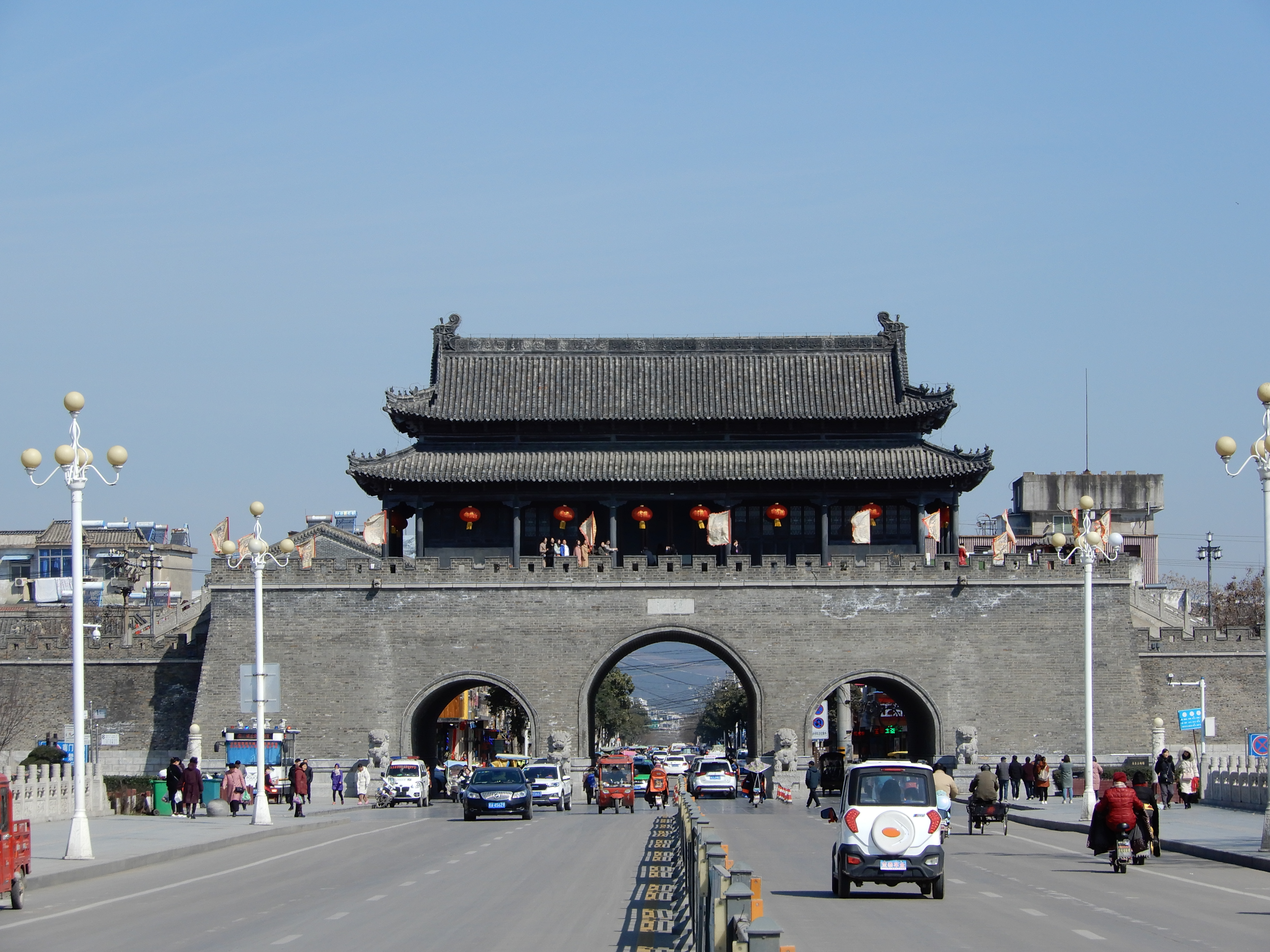 中文（中国大陆）: 寿县城墙通淝门